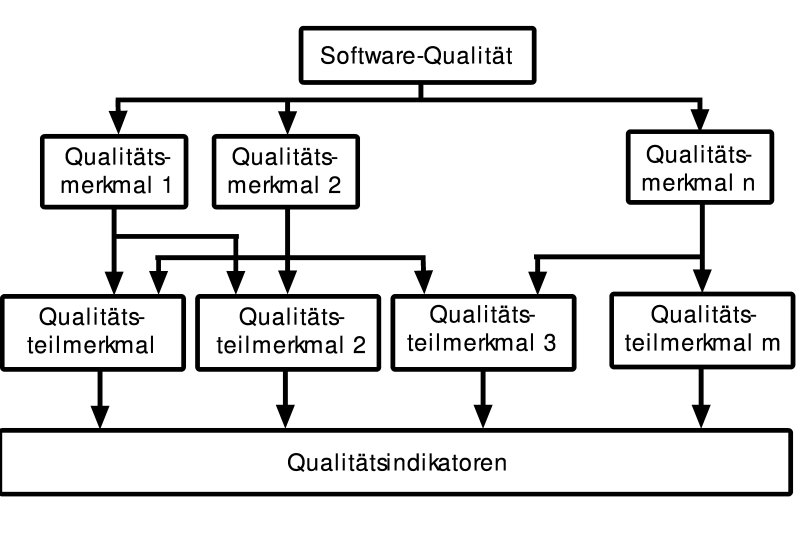 Schematische Darstellung eines FCM-Qualitätsmodells.